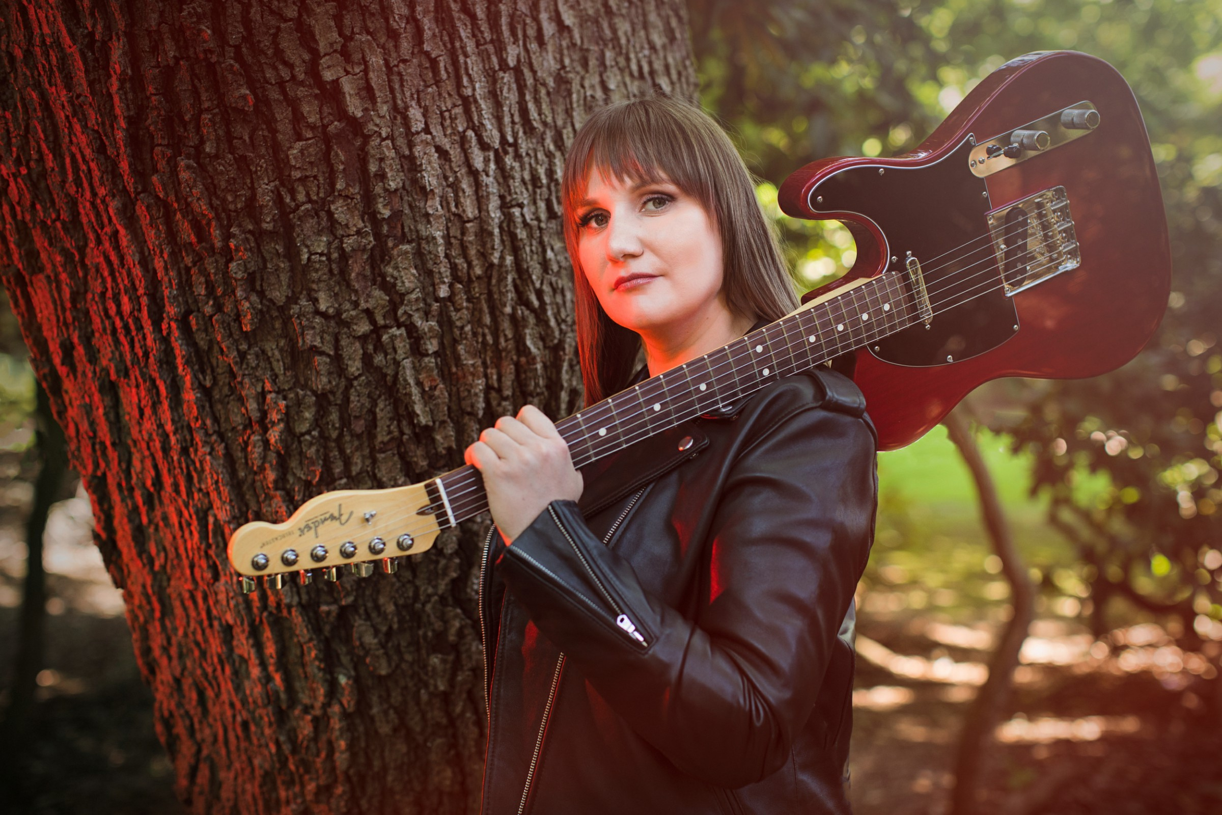 Karin Rabhansl - Fotosession zum Album "Tod & Teufel" (2018) in Hamburg. Foto: Katja Ruge